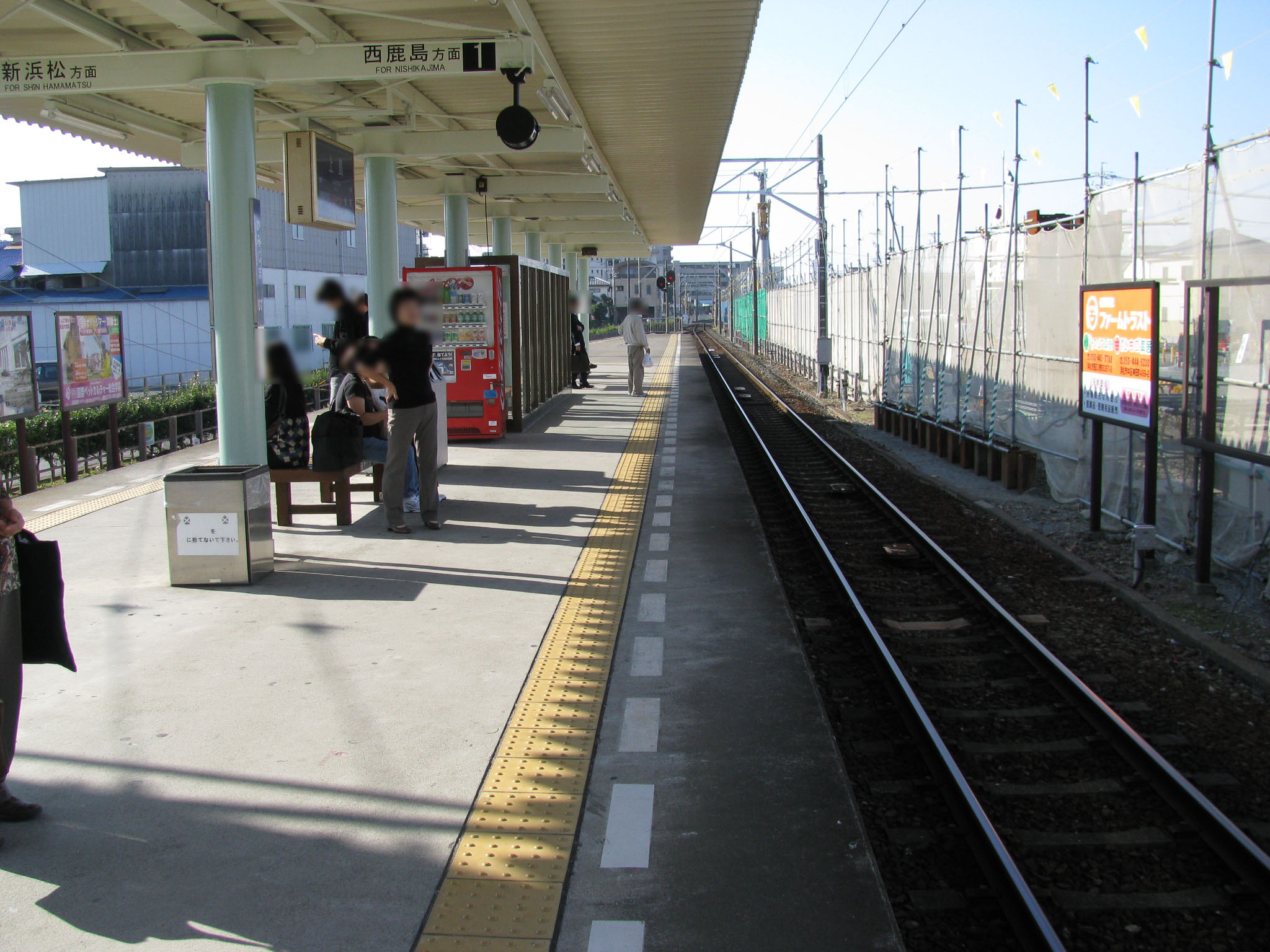 遠州鉄道上島駅